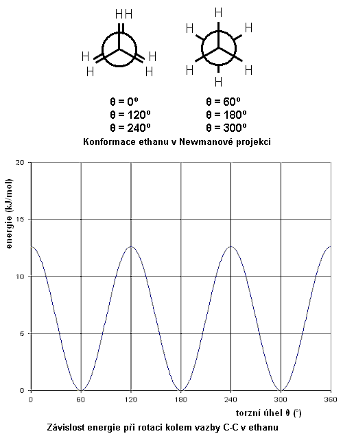 Konformace ethanu. V horní části jsou zobrazeny konformace v Newmanově projekci, v dolní je graf závislosti potenciální energie na trozním úhlu. Autor: Antonín Vítek, e-mail: avitek(at)lib(dot)cas(dot)cz Částečně použito obrázku z německé wikipedie